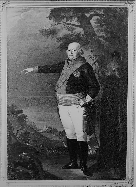 Dominik Constantin, 4. Fürst zu Löwenstein-Wertheim-Rochefort (1762-1814)